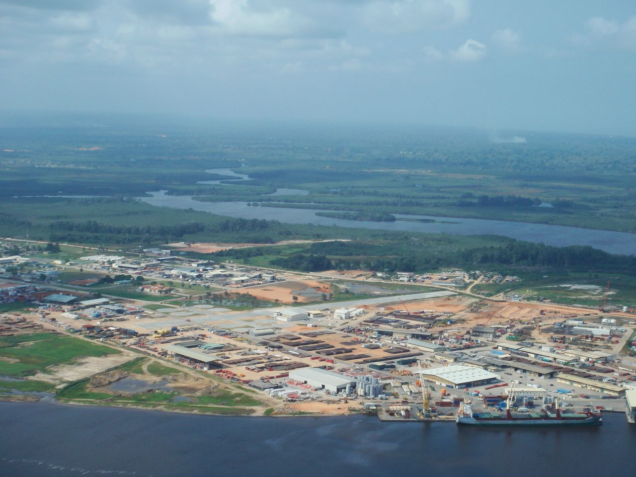 Soyo Kwanda base